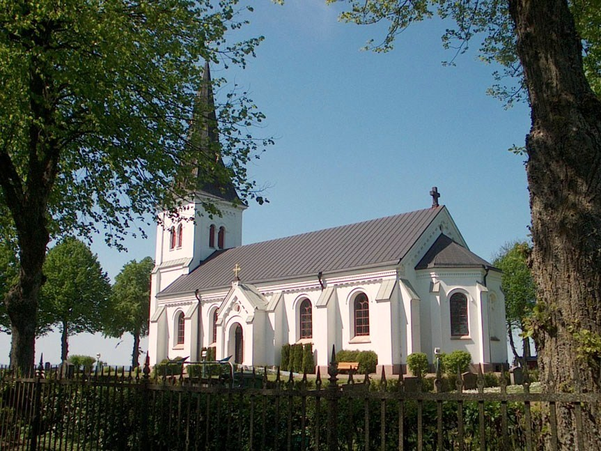 Appuna kyrka